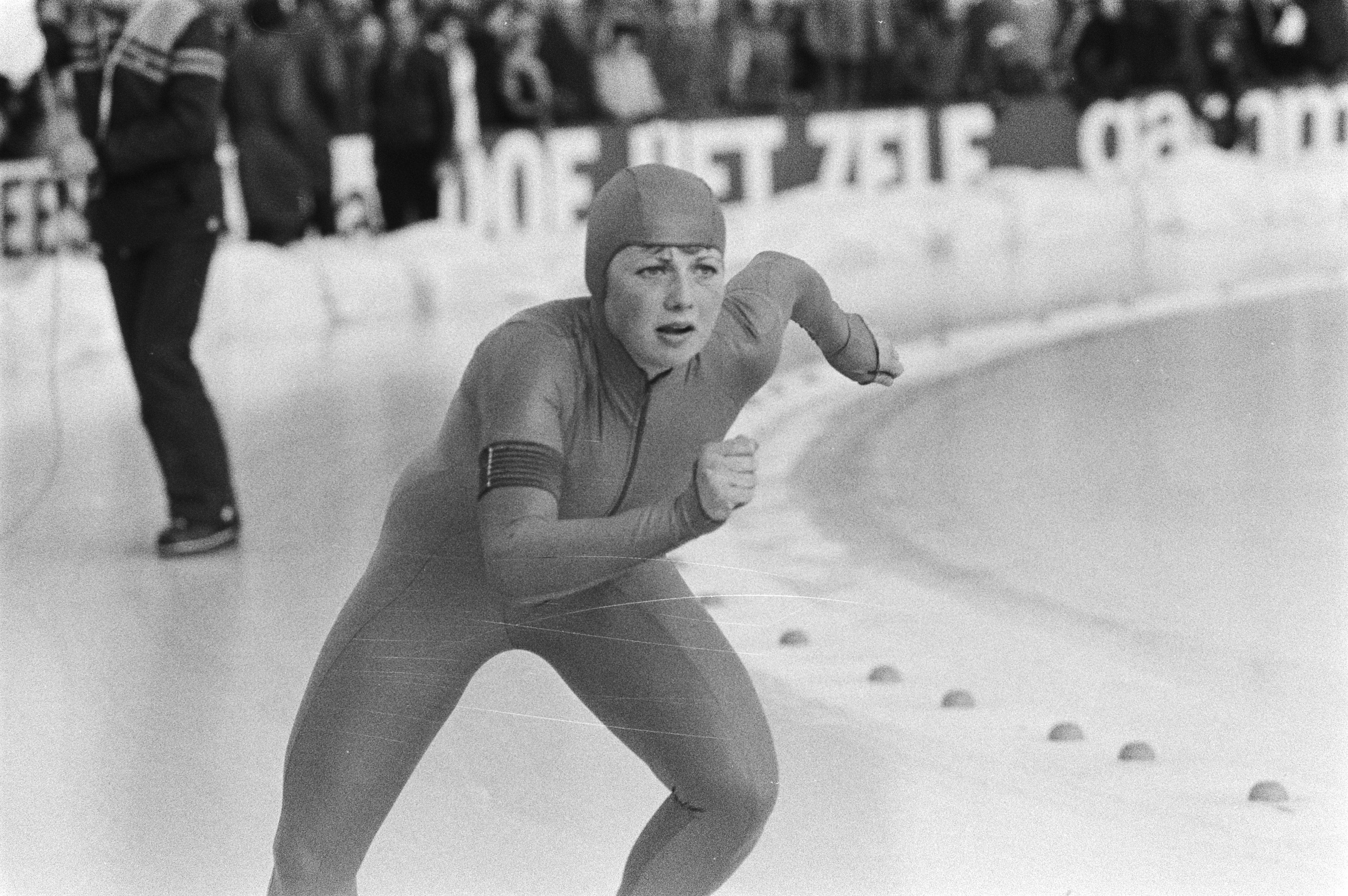 Collectie / Archief : Fotocollectie Anefo Reportage / Serie : [ onbekend ] Beschrijving : Wereldkampioenschappen schaatsen dames allround in Den Haag. Ria Visser in actie. Datum : 3 februari 1979 Locatie : Den Haag, Zuid-Holland Trefwoorden : schaatsen, sport Persoonsnaam : Visser, Ria Fotograaf : Suyk, Koen / Anefo Auteursrechthebbende : Nationaal Archief Materiaalsoort : Negatief (zwart/wit) Nummer archiefinventaris : bekijk toegang 2.24.01.05 Bestanddeelnummer : 930-1057